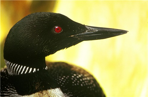 Eistaucher (Gavia immer), Sommerkleid - "Common Loon"